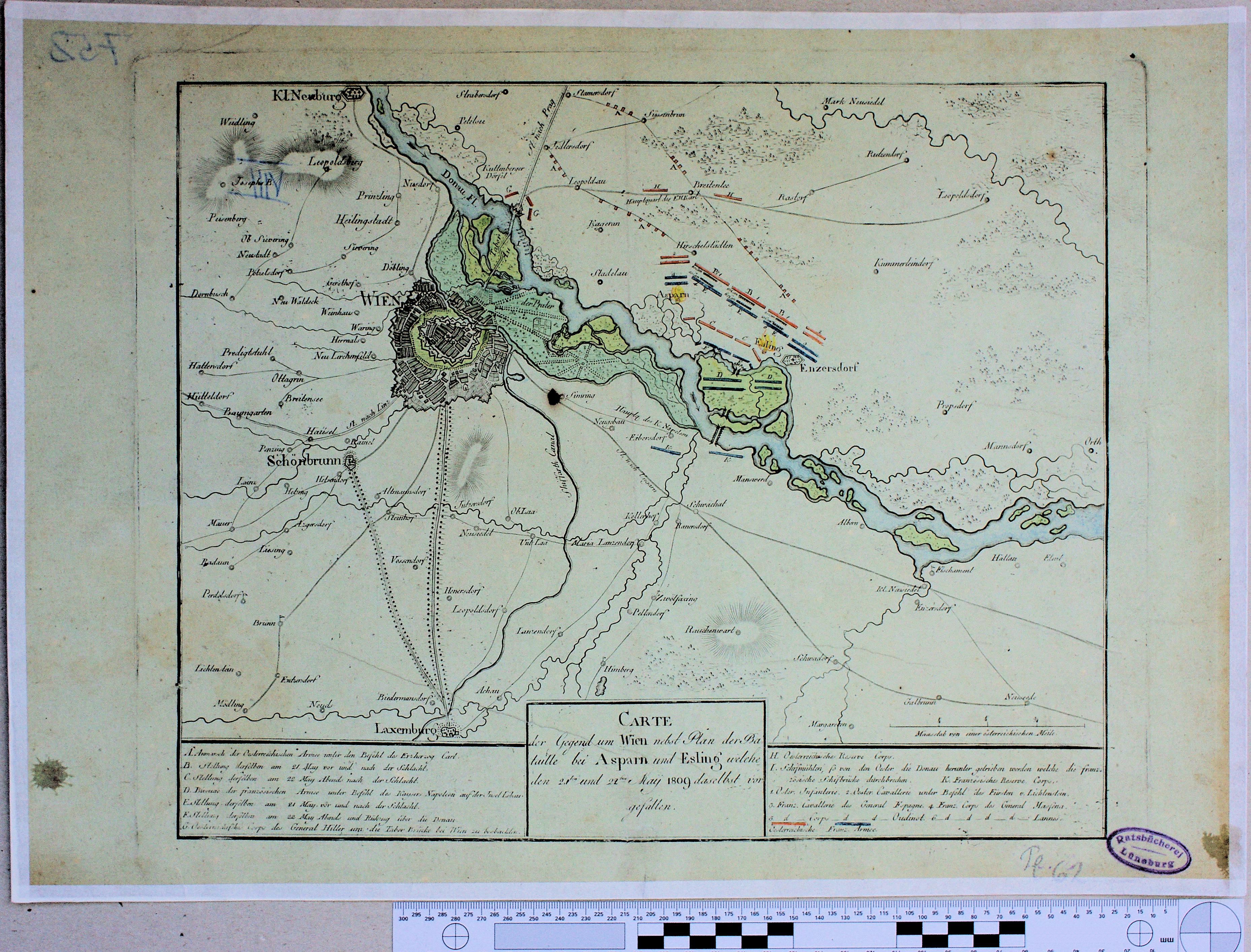 Die Bilder enstanden anläßlich eines Workshops im Rahmen von Skillshare 2010 in Zusammenarbeit mit dem Stadtarchiv Lüneburg. Die Originale wurden freundlicherweise vom Stadtarchiv zur Verfügung gestellt. . Wien 1809 Registratur: K 41 Nr 31